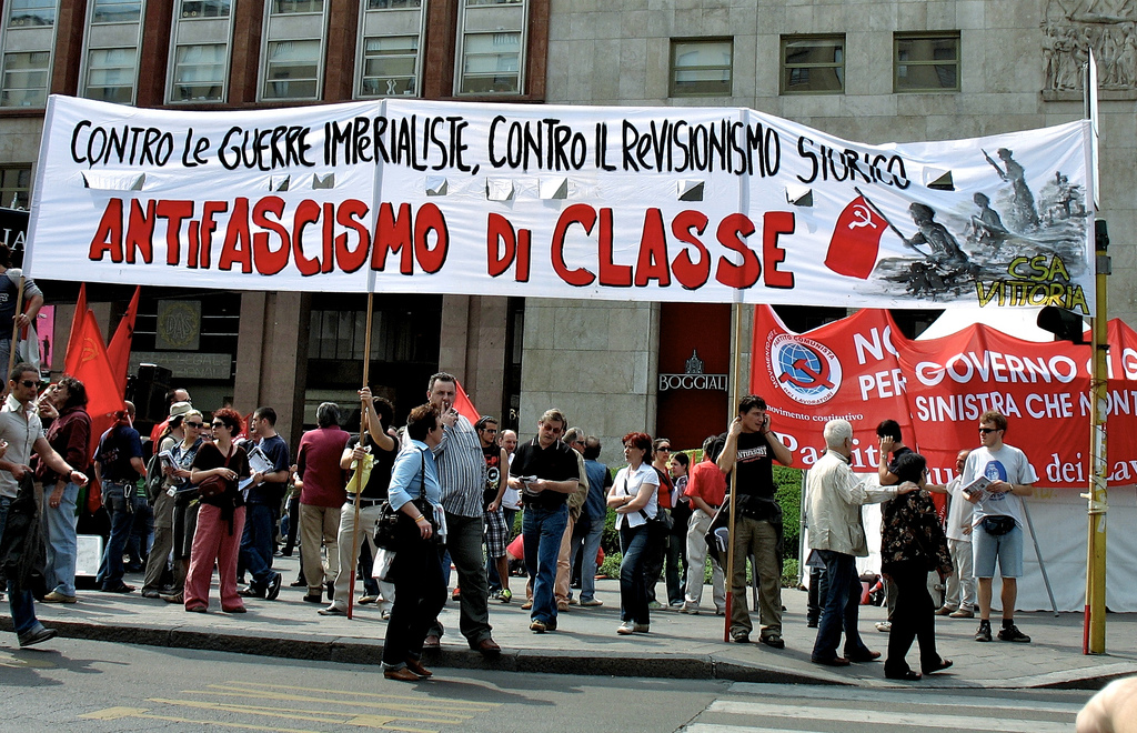 Anniversario della Liberazione d'Italia - Milano